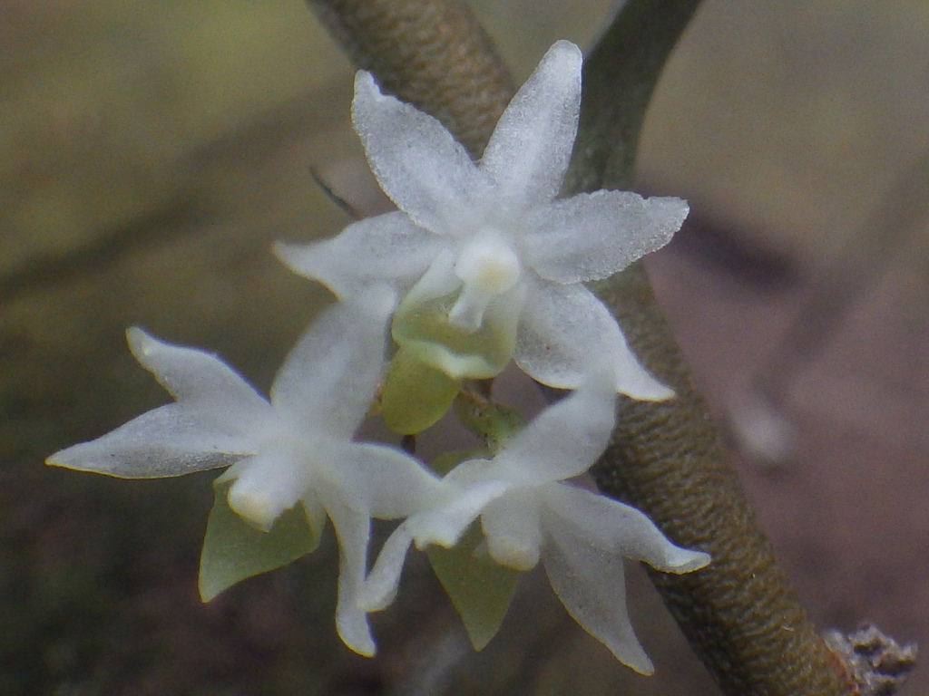 Fleurs petites, résupinées, translucides, blanches.